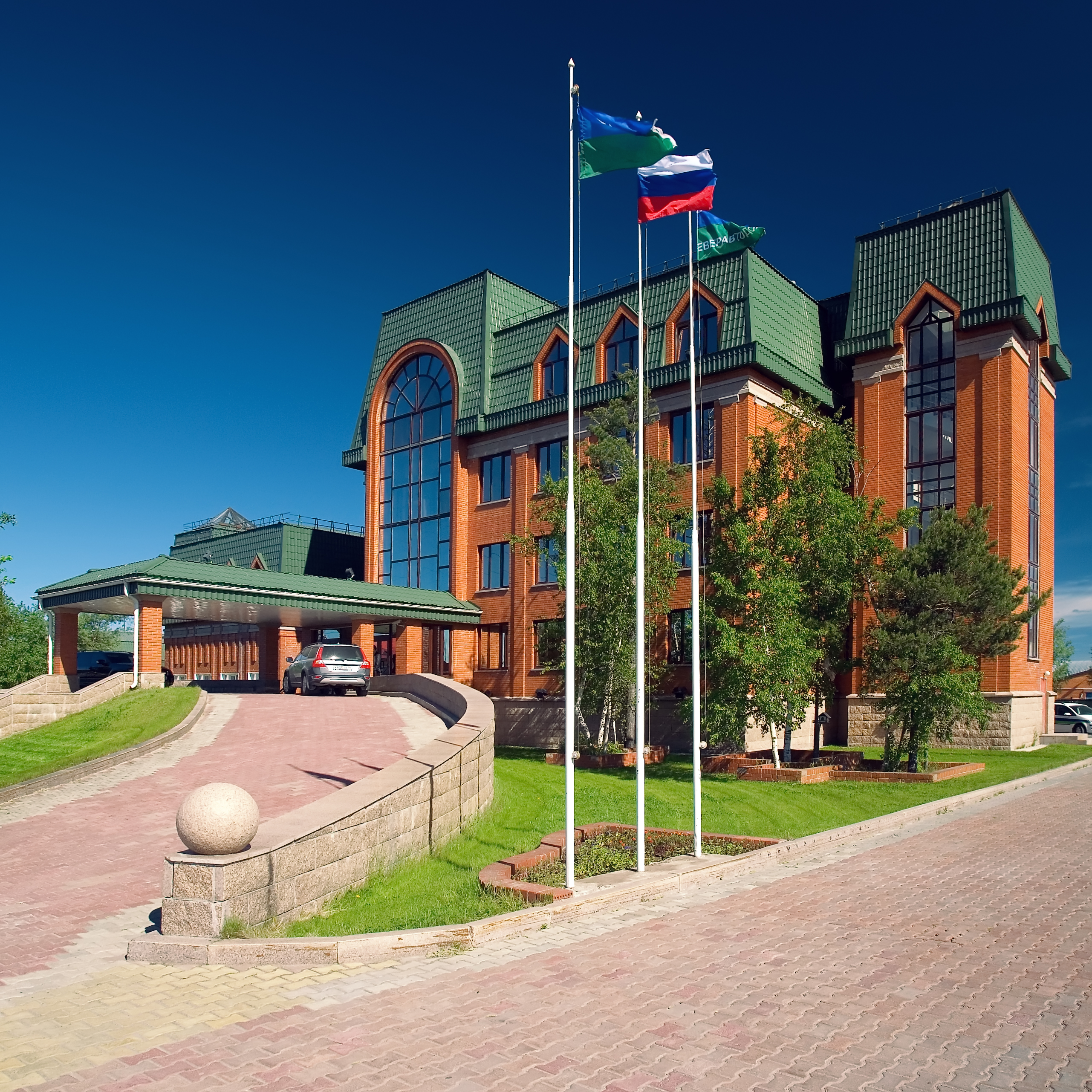 центарльный офис ГП "Северавтодор" в г.Сургуте